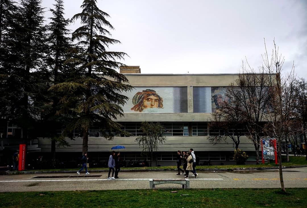 Hacettepe Üniversitesi Beytepe Kampüsü